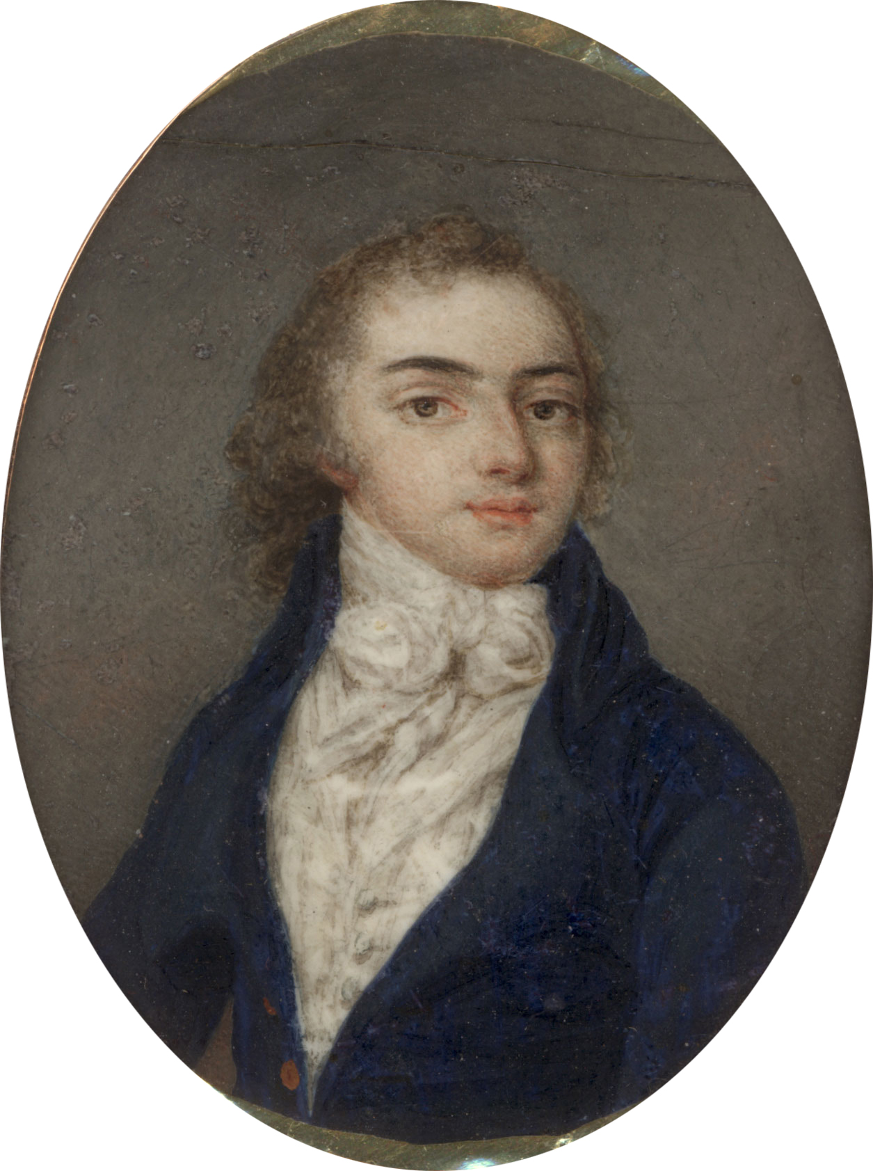 Беларуская (тарашкевіца): Партрэт Міхала Клеафаса Агінскага (Michał Kleafas Aginski)